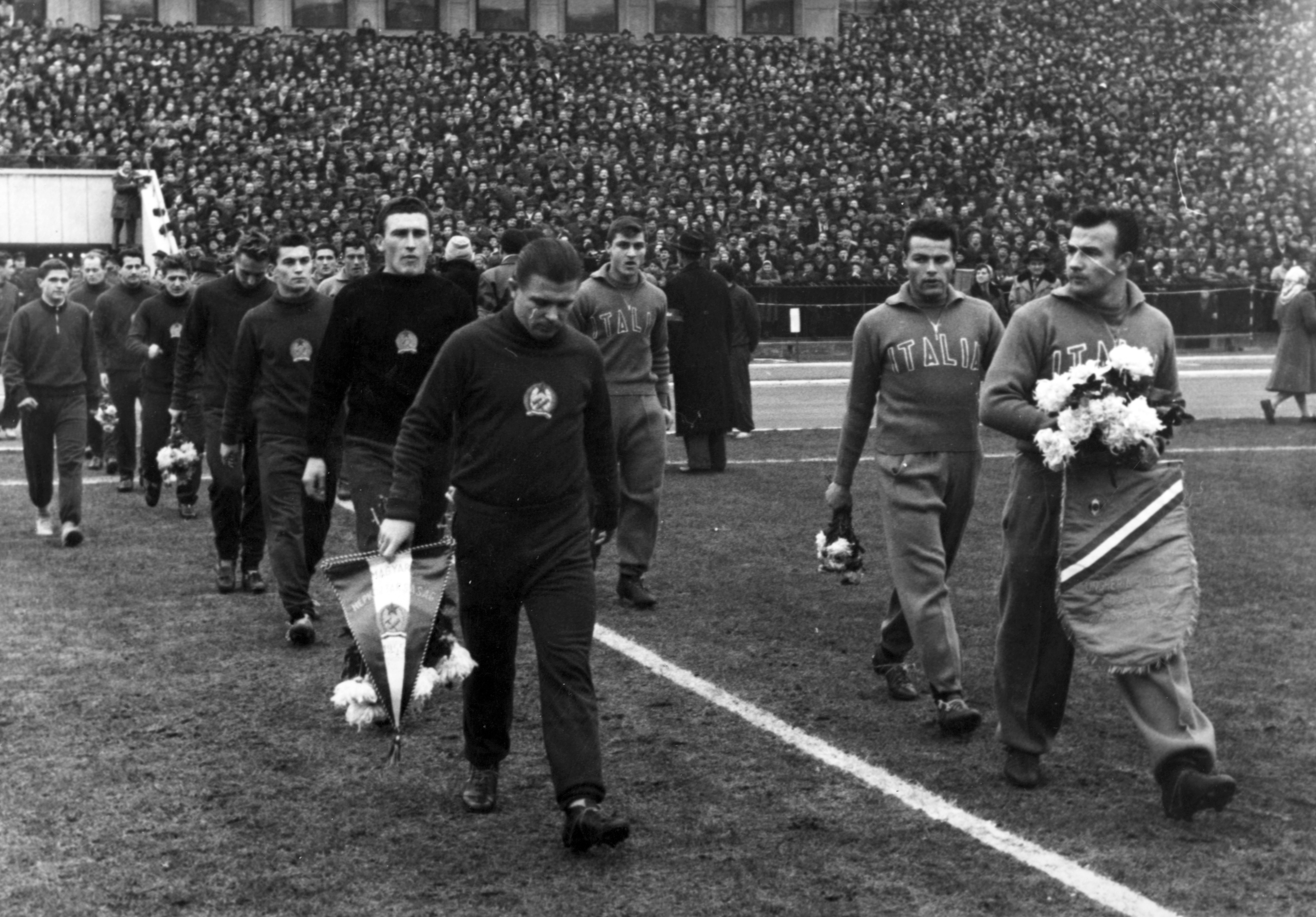 Magyarország - Olaszország (2:0) Európa-kupa mérkőzés 1955. november 27-én. Baloldalt a magyar csapat tagjai: Puskás, Faragó, Kotász, Szojka, Czibor, Bozsik, Buzánszky. Location: Hungary, Budapest XIV., Népstadion Tags: Budapest Title: Magyarország - Olaszország (2:0) Európa-kupa mérkőzés 1955. november 27-én. Baloldalt a magyar csapat tagjai: Puskás, Faragó, Kotász, Szojka, Czibor, Bozsik, Buzánszky.